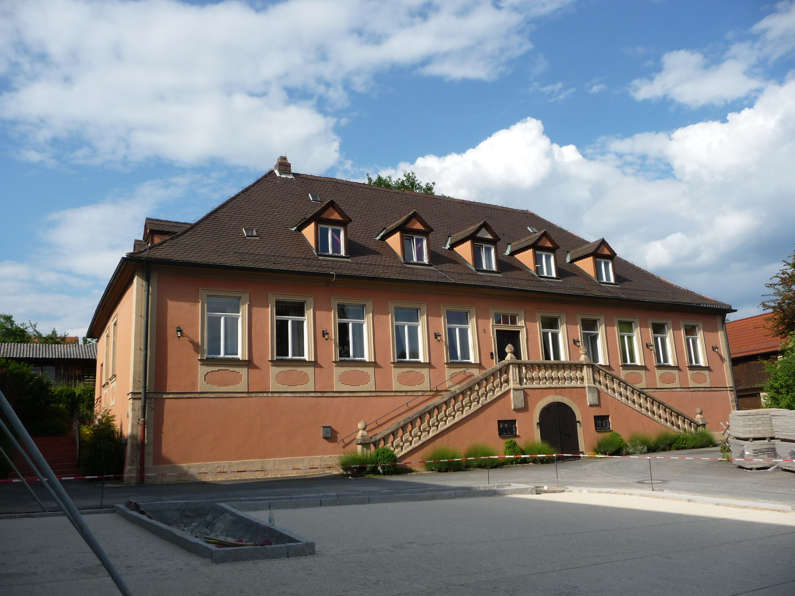 Stegaurach ist eine Gemeinde im oberfänkischen Landkreis Bamberg im Norden Bayerns.